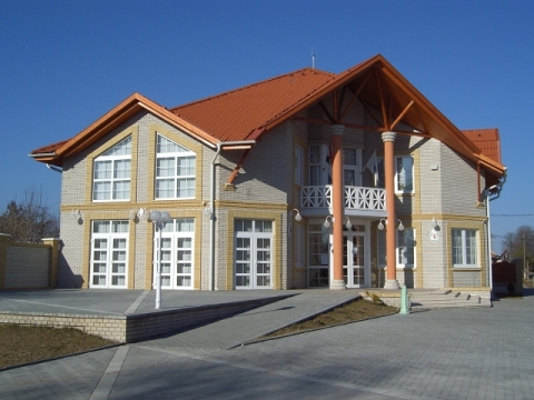 Polgármesteri Hivatal, Kakucs